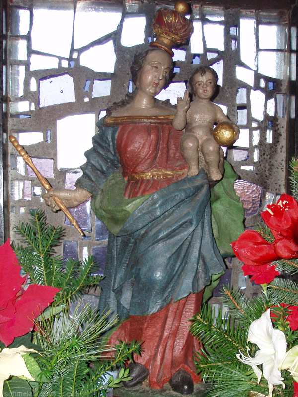 Katholische Kirche St. Michael in Heilbronn-Neckargartach